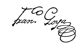 Firma autógrafa de Goya